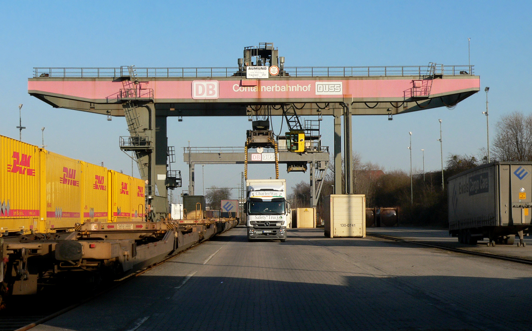 Containerbahnhof am Bahnhof Linden Fischerhof